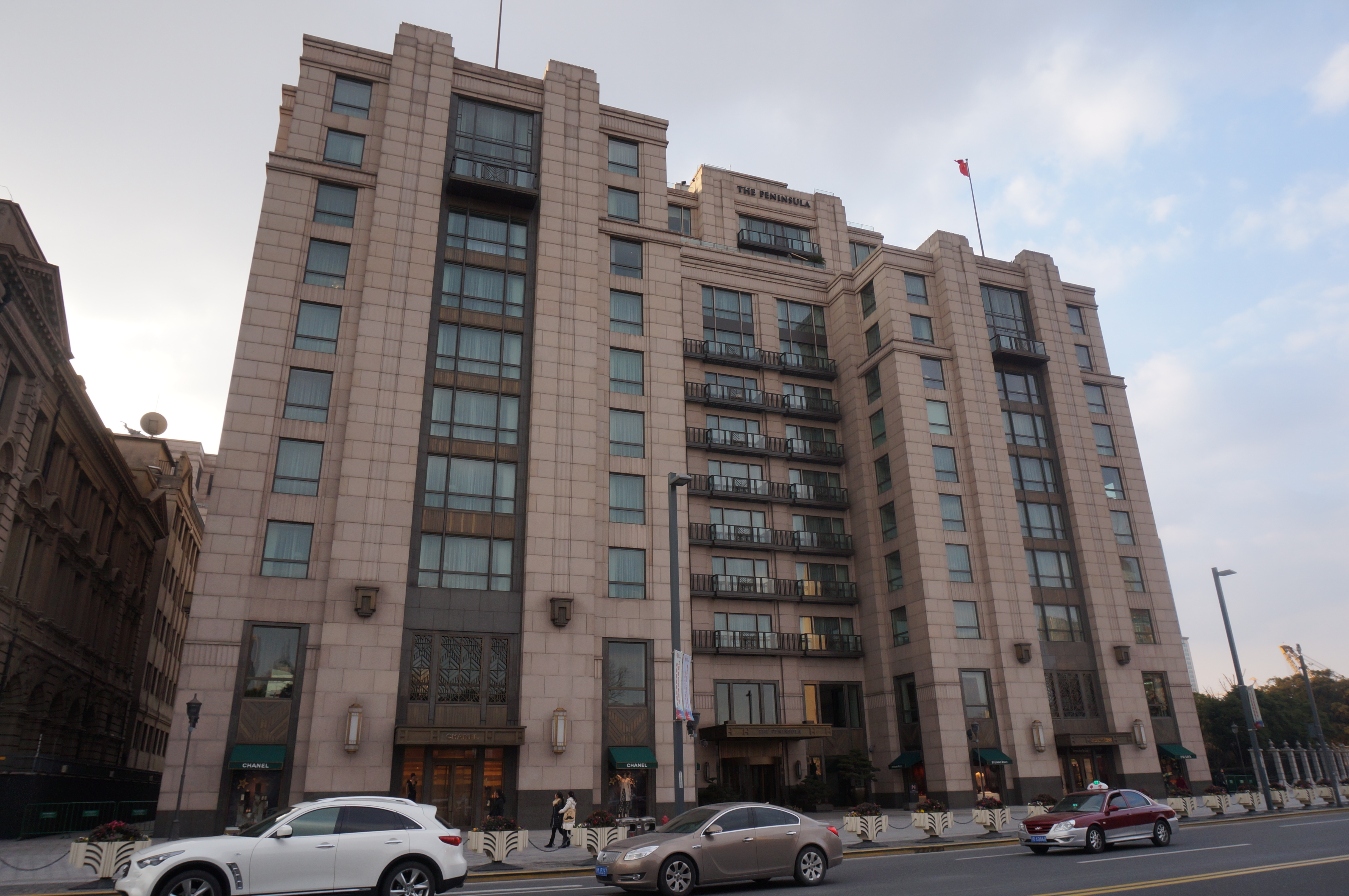 上海外滩半岛酒店